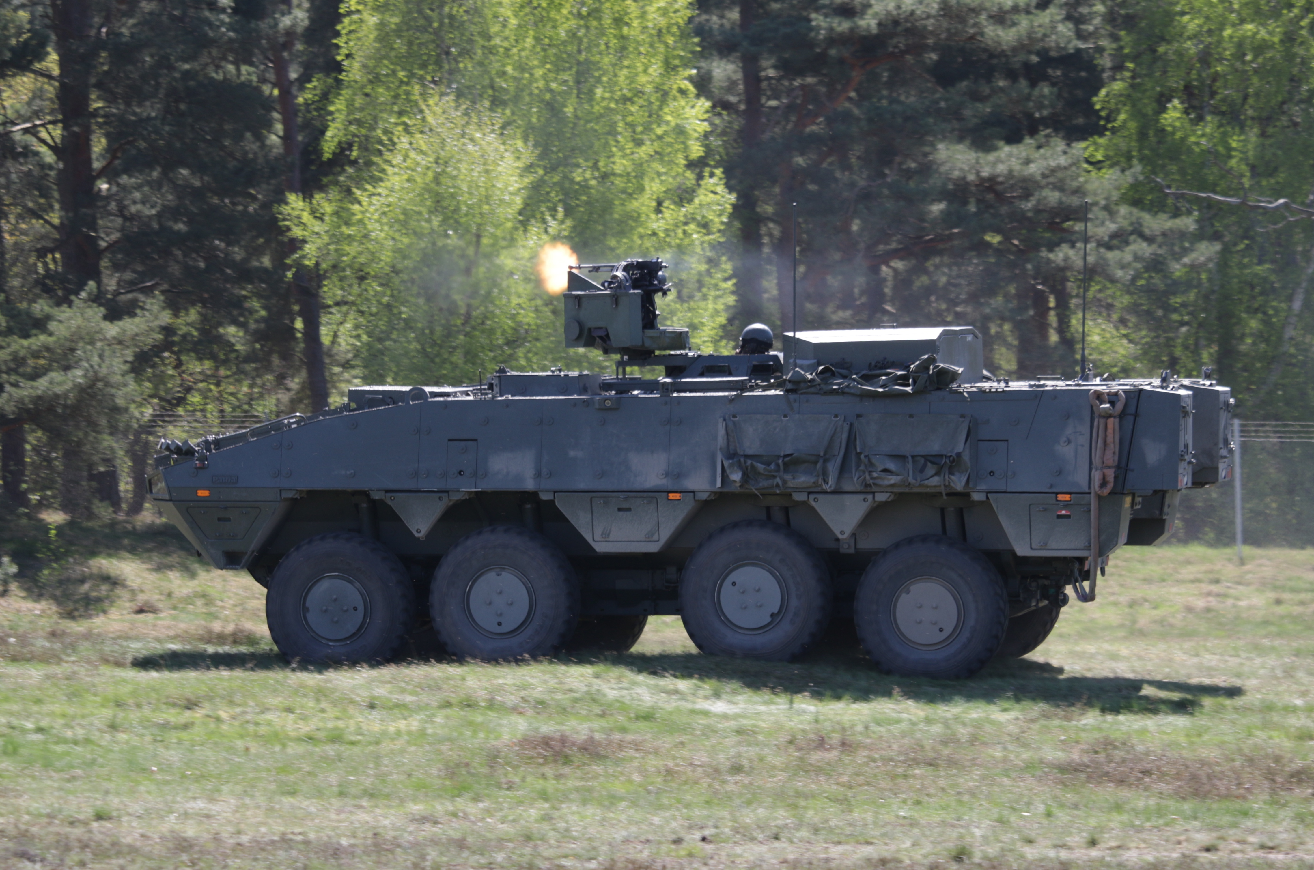 Pansarterrängbil 360